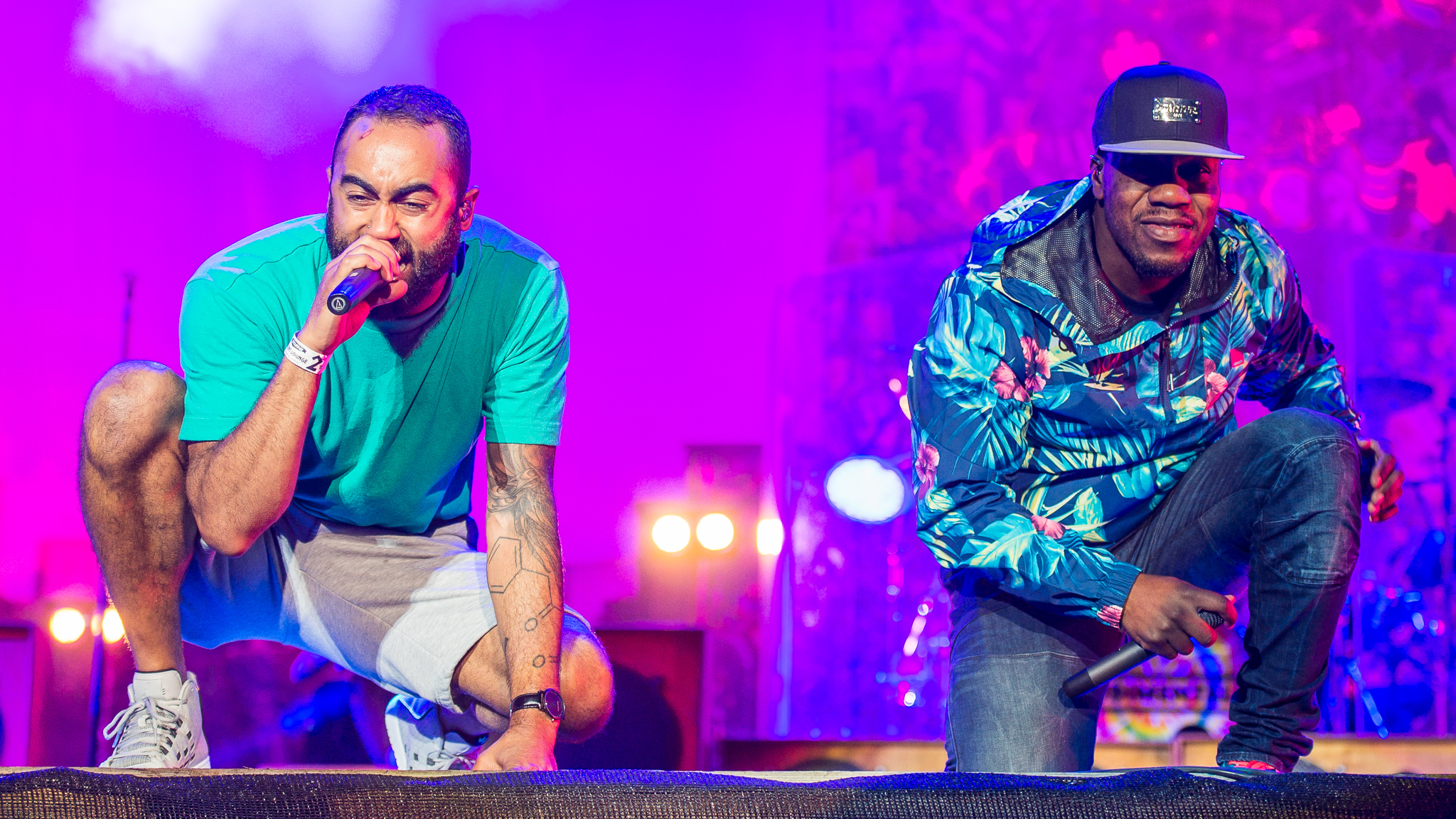 ARGO-Konzerte,Beck's Park Stage,Festival,Konzert,Livekonzert,Livemusik,Musik,RiP,Rock im Park 2016,Rudimental